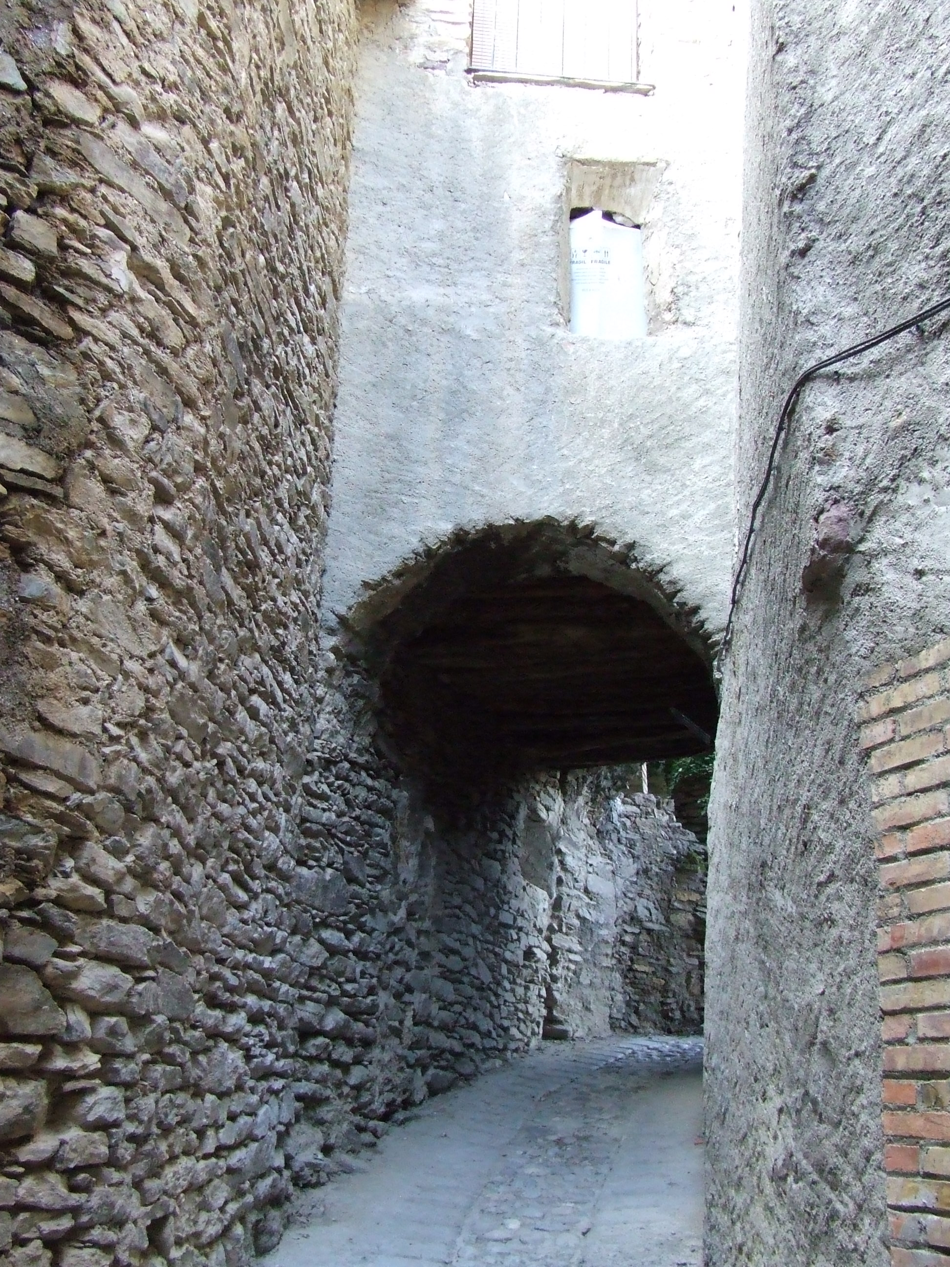 Portal interior de Guiró (la Torre de Cabdella, Pallars Jussà)